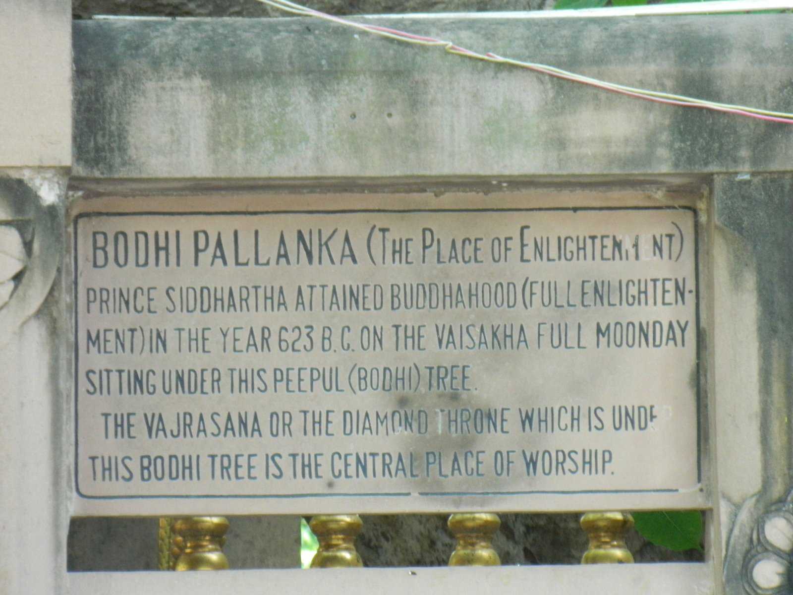 Bodhi Tree Marking